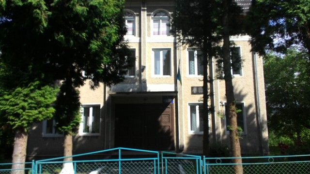 Лікарська амбулаторія с. Долина (Тлумацький район, Івано-Франківська область)